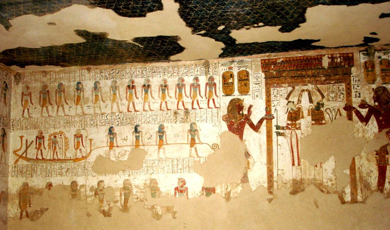 Eigen fotobewerking Luxor januari 2007 Ben Pirard: graf van Merenptah